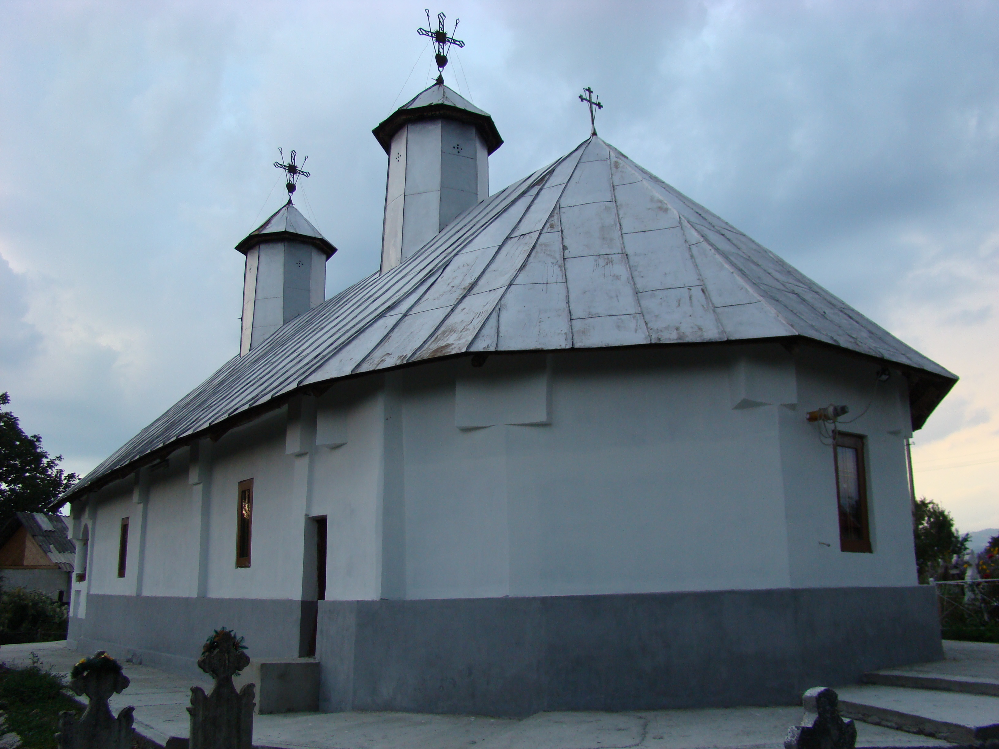 Biserica ortodoxă din Poienari, județul Gorj